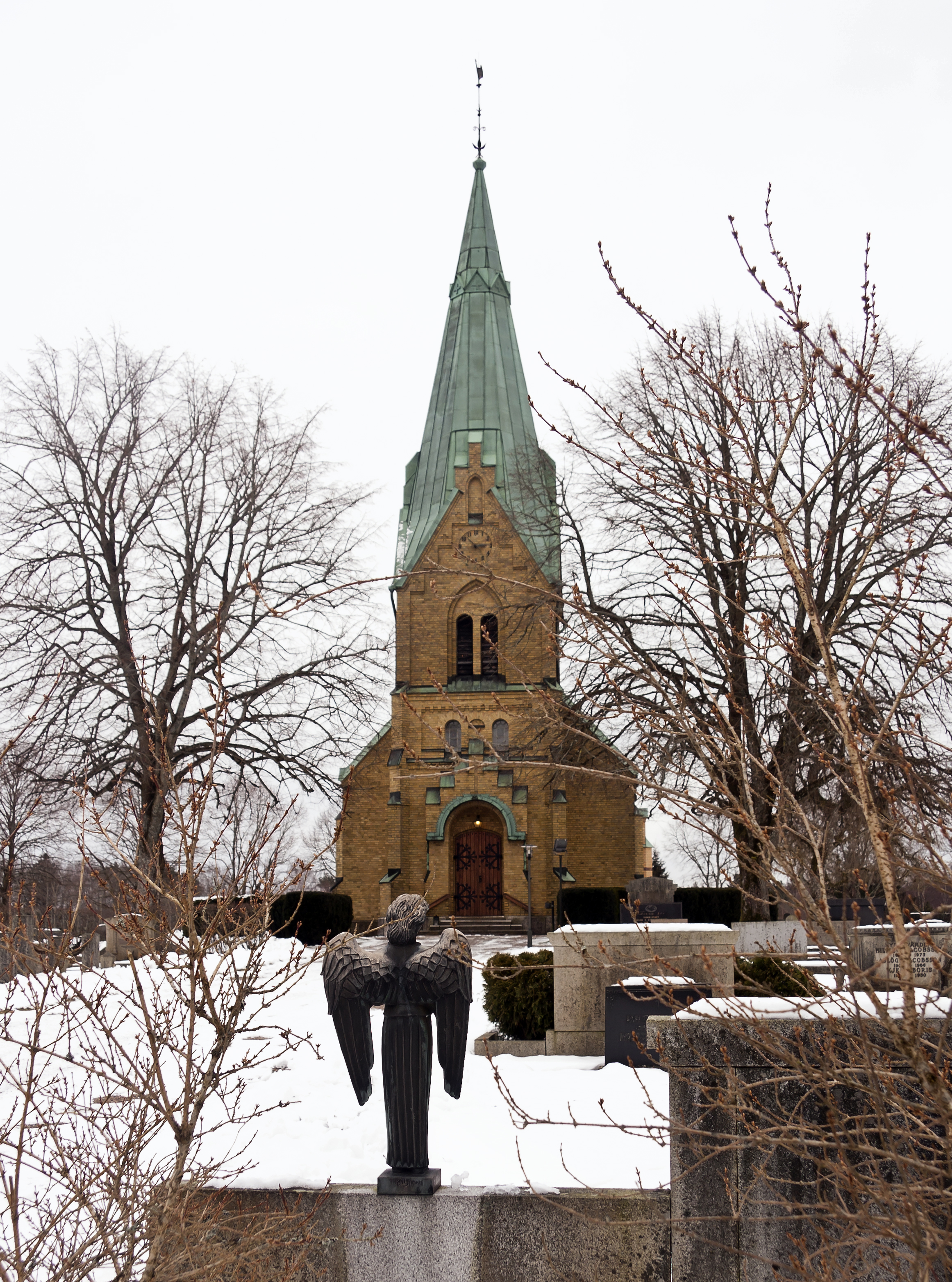 Skånes-Fagerhults kyrka.